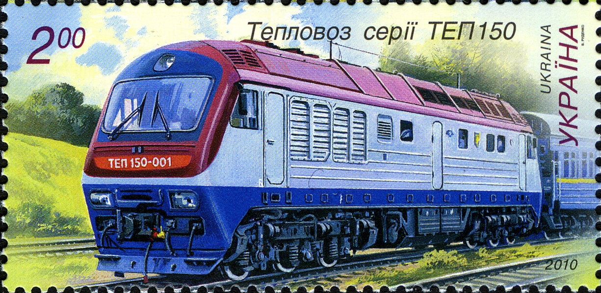 Марка України «Тепловоз серії ТЕП150»